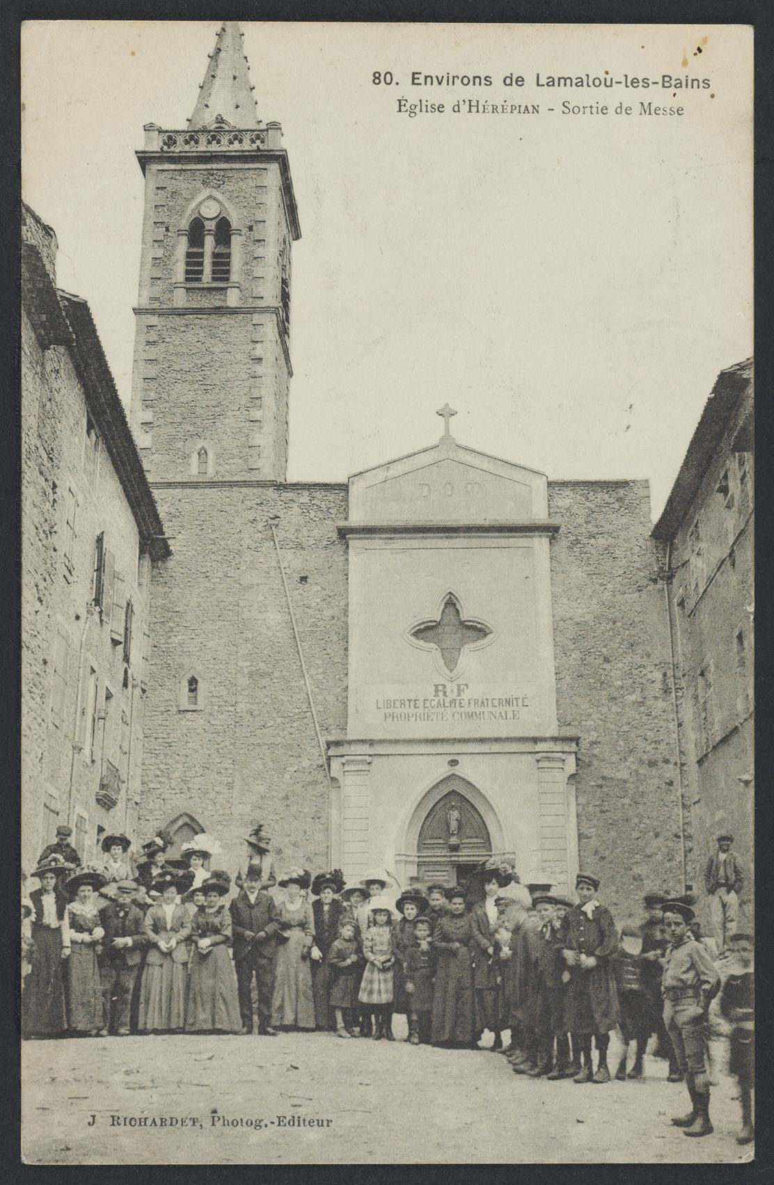 Hérépian. - Église, sortie de messe : carte postale.